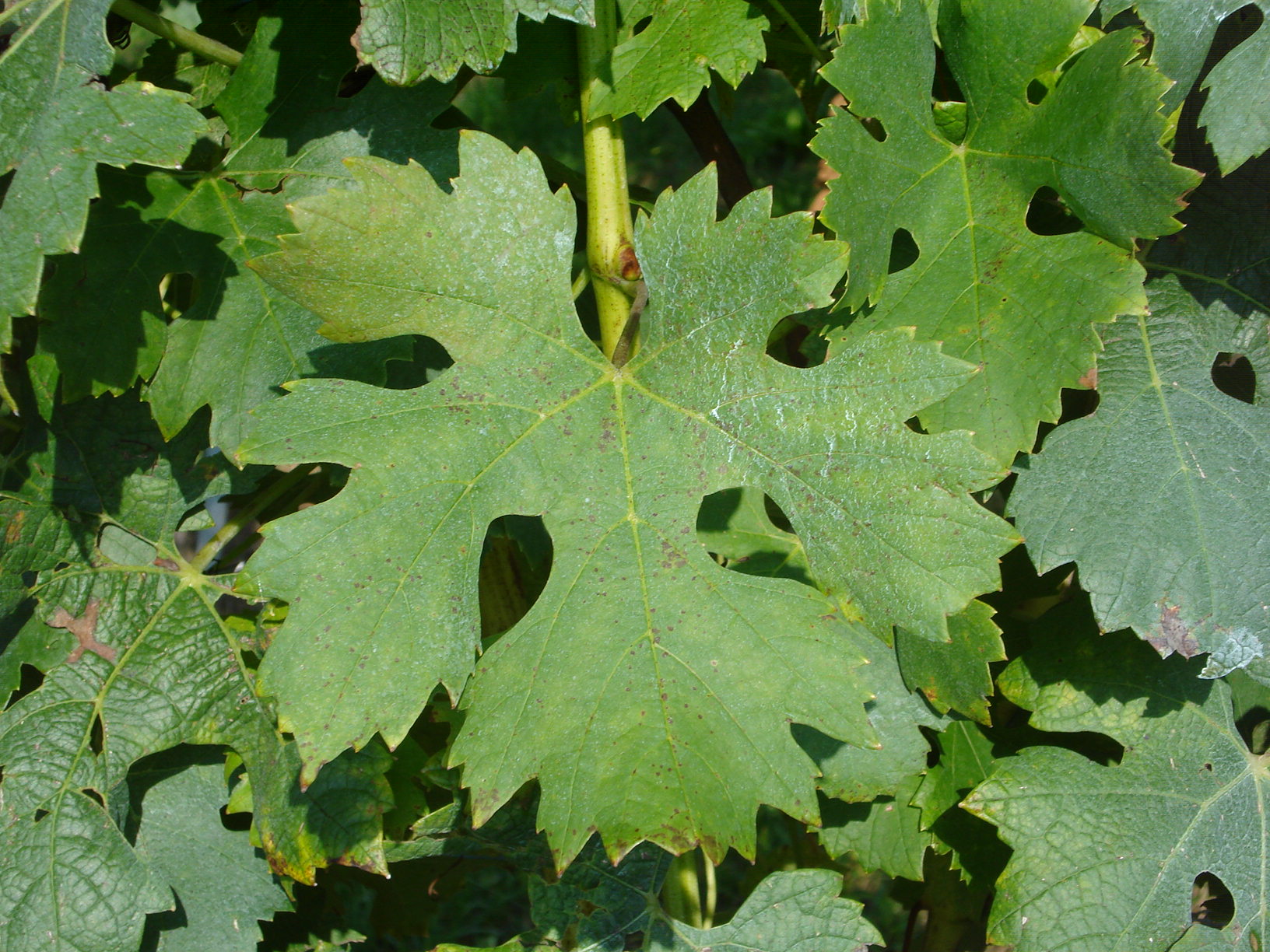 Blatt der Wießweinsorte Cabernet blanc